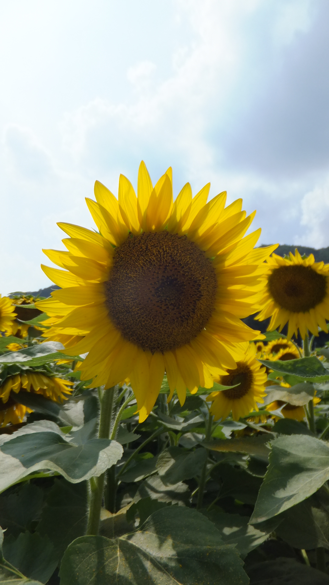 佐用町南光ひまわり祭り・ひまわりめいろ